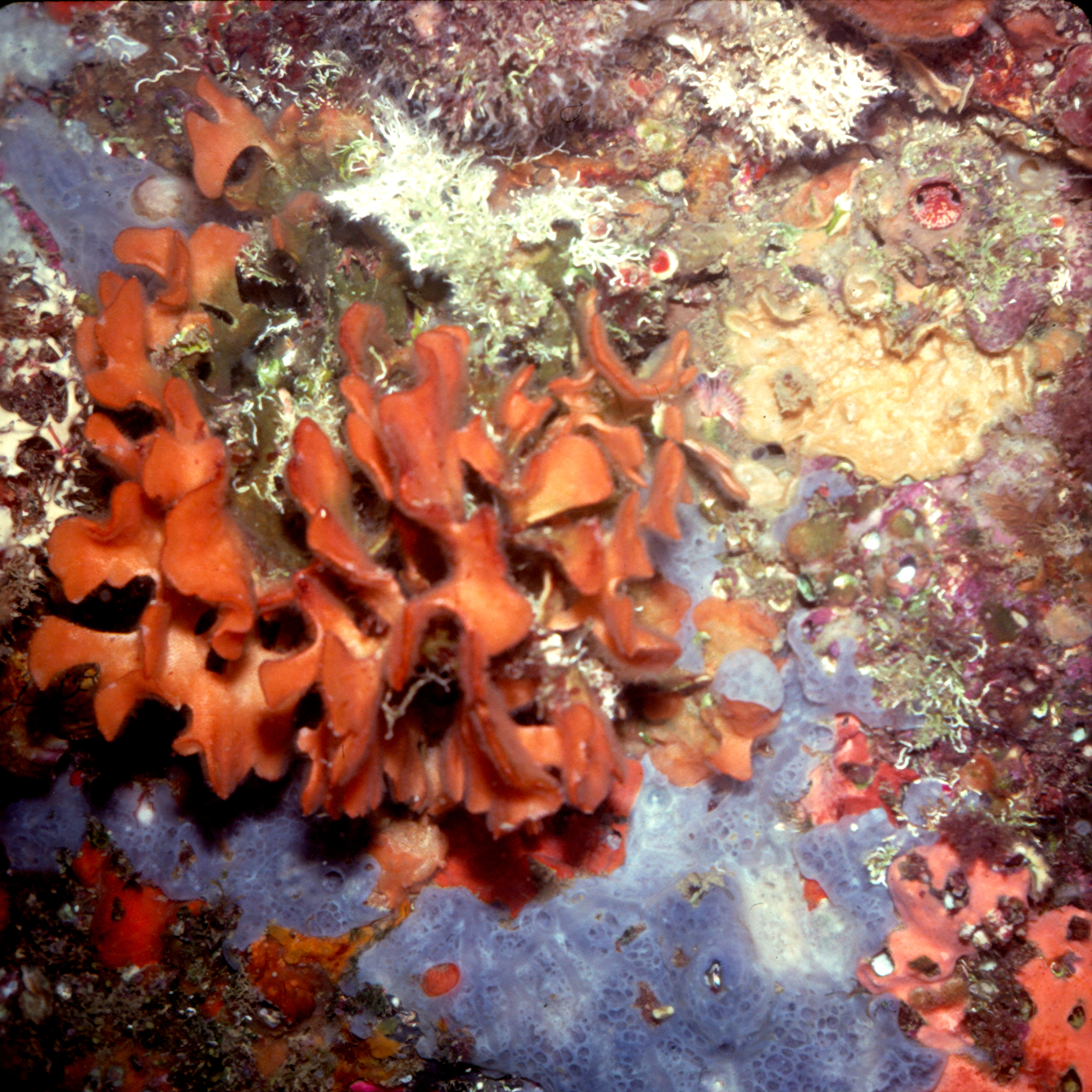 Colonie de Pentapora (Hippodiplosia) fascialis